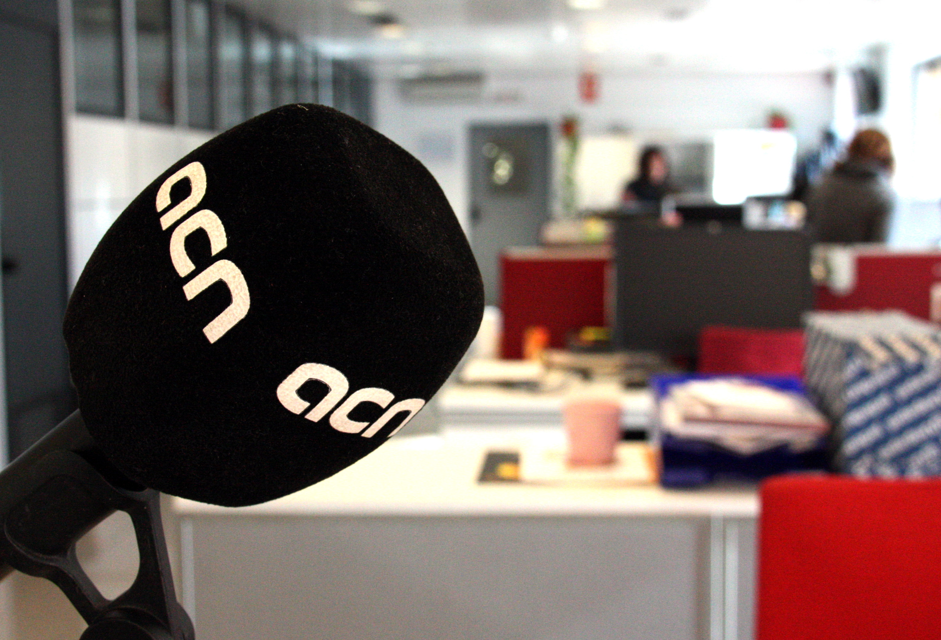 Nova imatge corporativa de l'ACN, escuma de micro.